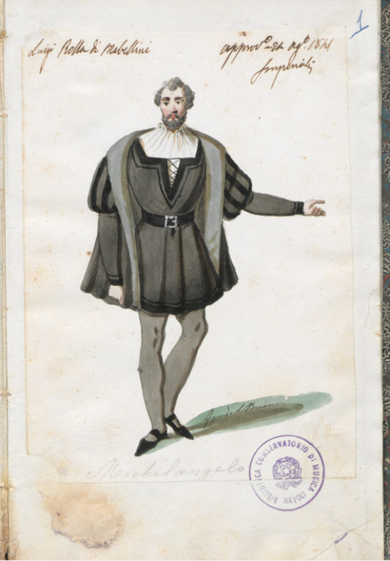 Bozzetto di Filippo Del Buono per la ripresa a Napoli del 1841 dell'opera di Teodulo Mabellini «Rolla», conservato al Conservatorio di San Pietro a Majella